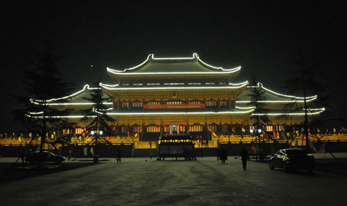 河北梅花圣地师祖殿